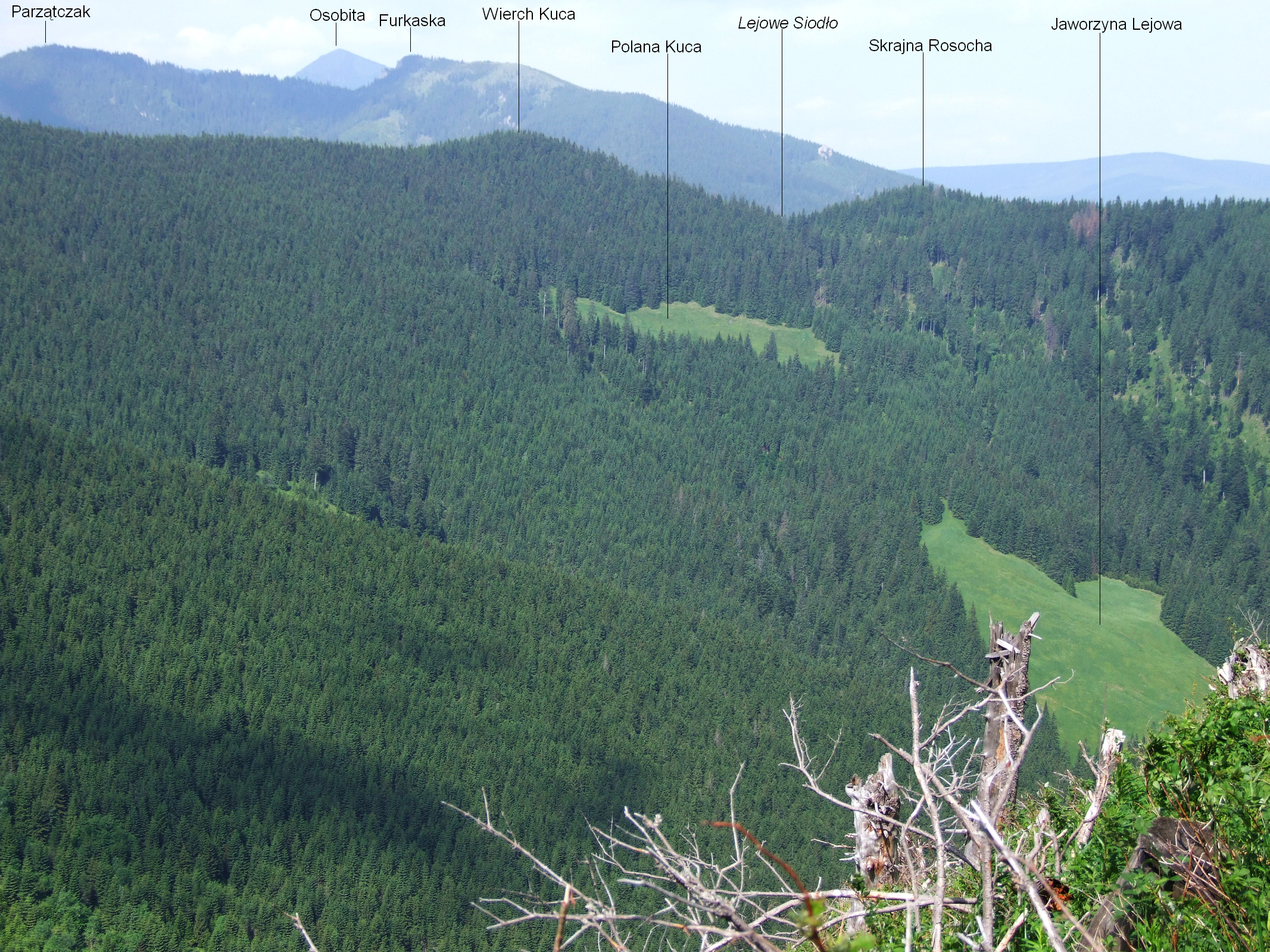 Widok na Grzbiet Zadniej Rosochy